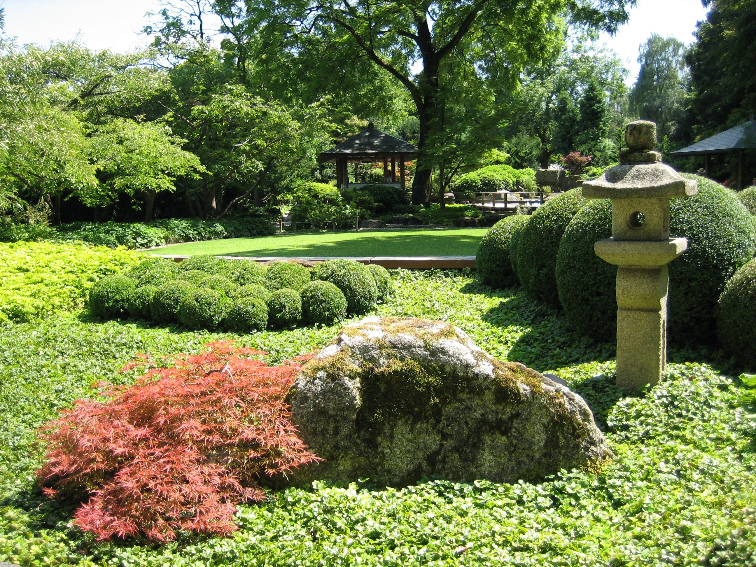 Botanischer Garten in Augsburg, im mittleren Teil des Japangartens